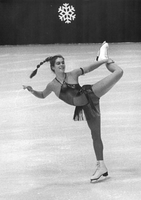 Katarina Witt ADN-ZB Thieme 21.12.1985 Karl-Marx-Stadt: DDR-Meisterschaften im Eiskunstlaufen.- Olympiasiegerin und Weltmeisterin Katarina Witt (SC Karl-Marx-Stadt) präsentierte ihre erste Kurzkür eindrucksvoll und erhielt am 20.12.1985 in der Damenkonkurrenz die höchsten Noten.